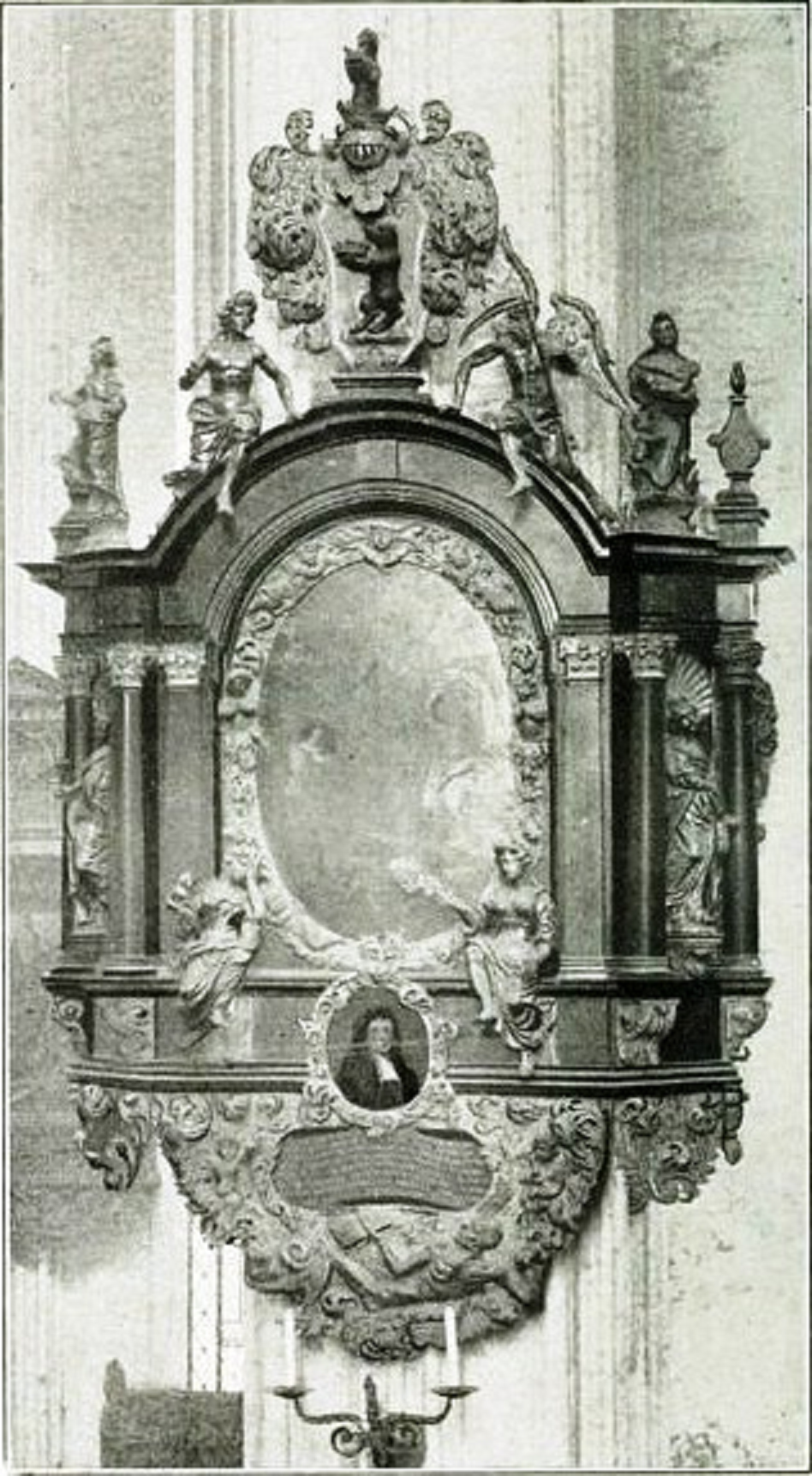 Epitaph des Lübecker Ratsherren Diedrich (von) Bartels (* 6. März 1633 in Lübeck; † 24. September 1689 ebenda); 1693 errichtet in der Lübecker Marienkirche, 1942 beim Luftangriff auf Lübeck zerstört. (Das Familienwappen zeigt im blau-golden geteilten Schild einen aufgerichteten schwarzen Bären, der in seinen Vordertatzen eine goldene Krone hält. Auf dem gekrönten Spangenhelm der gleiche Bär wachsend.)